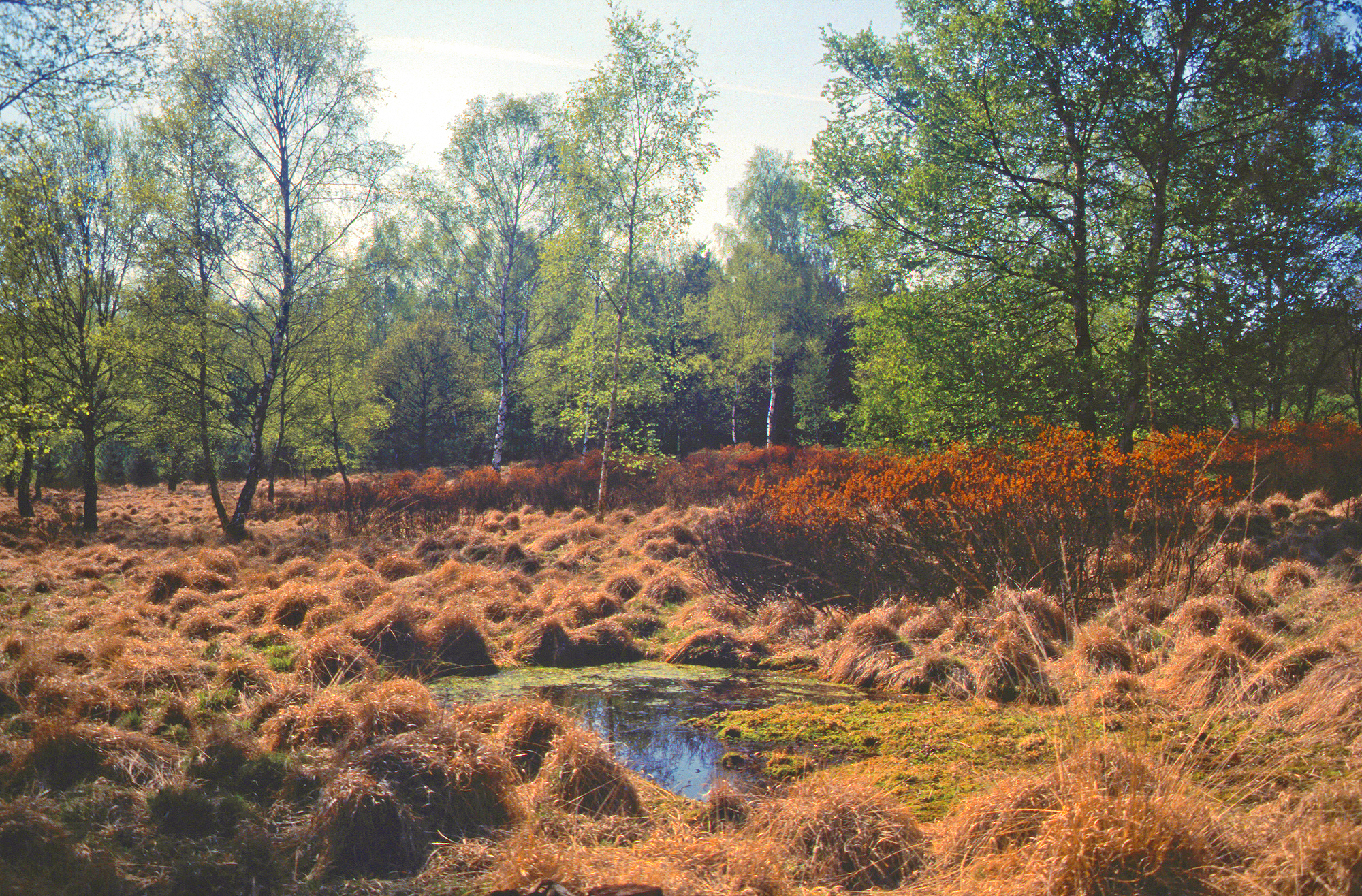 NSG SG-001 Ohligser Heide: Heidemoor mit blühendem Gagelstrauch im Hintergrund, vorn ein Kolk, umgeben von Grasbulten.